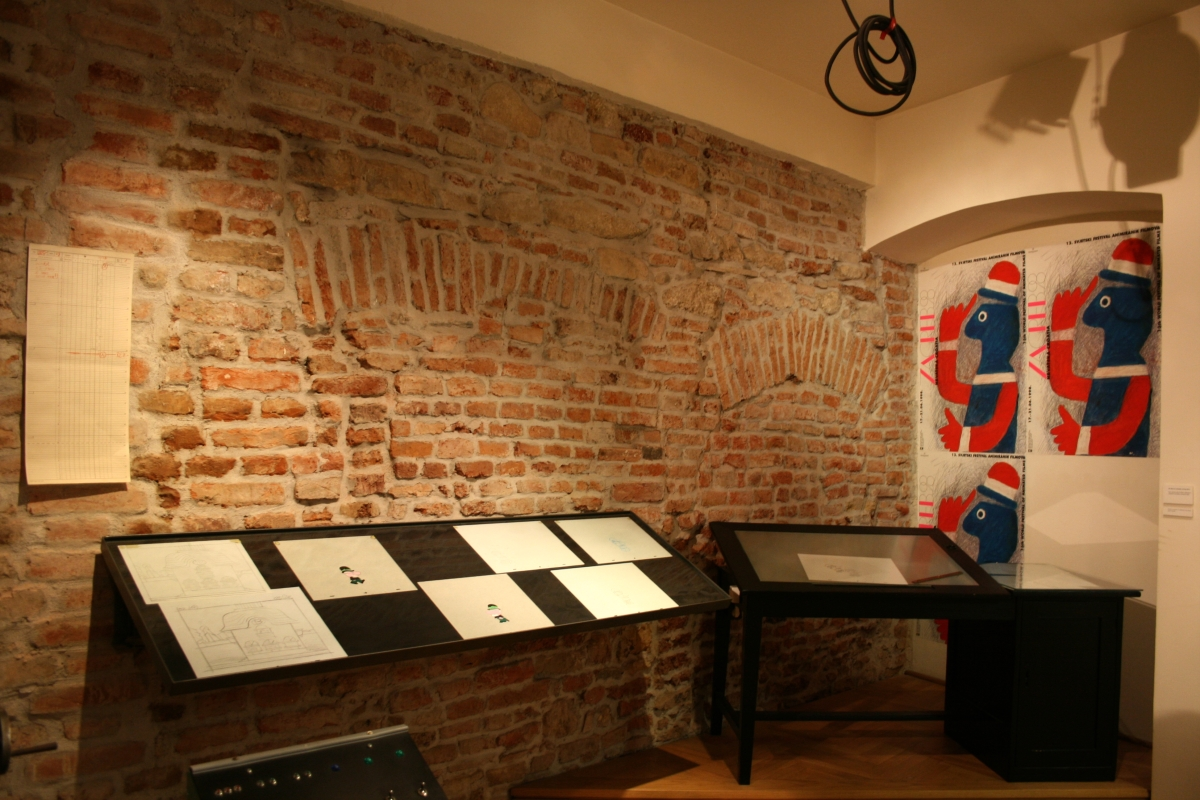 Faze ciklusa hoda Profesora Baltazara i kopističko kolorističke celuloidne folije, od sličice do crtanog filma. Muzej grada Zagreba